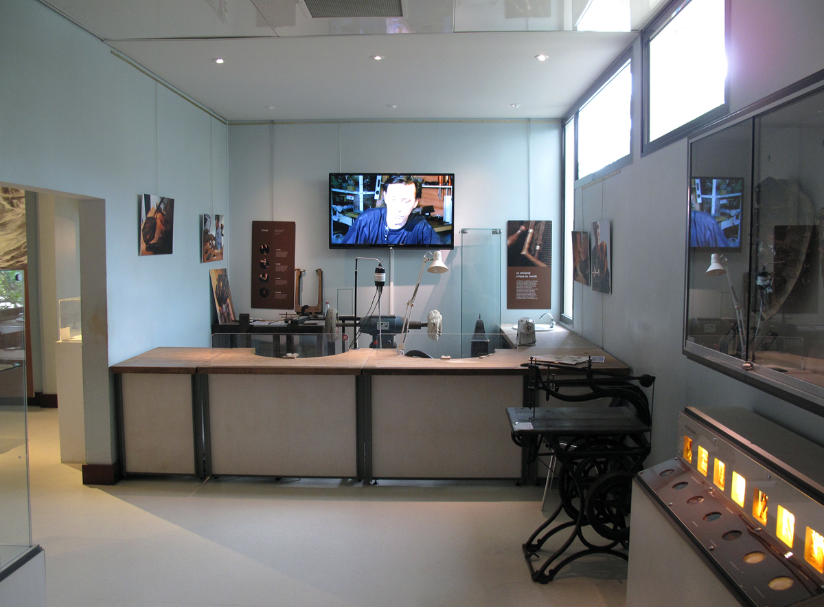 L'atelier des écaillistes à l’observatoire des tortues marines Kélonia, à la Réunion.